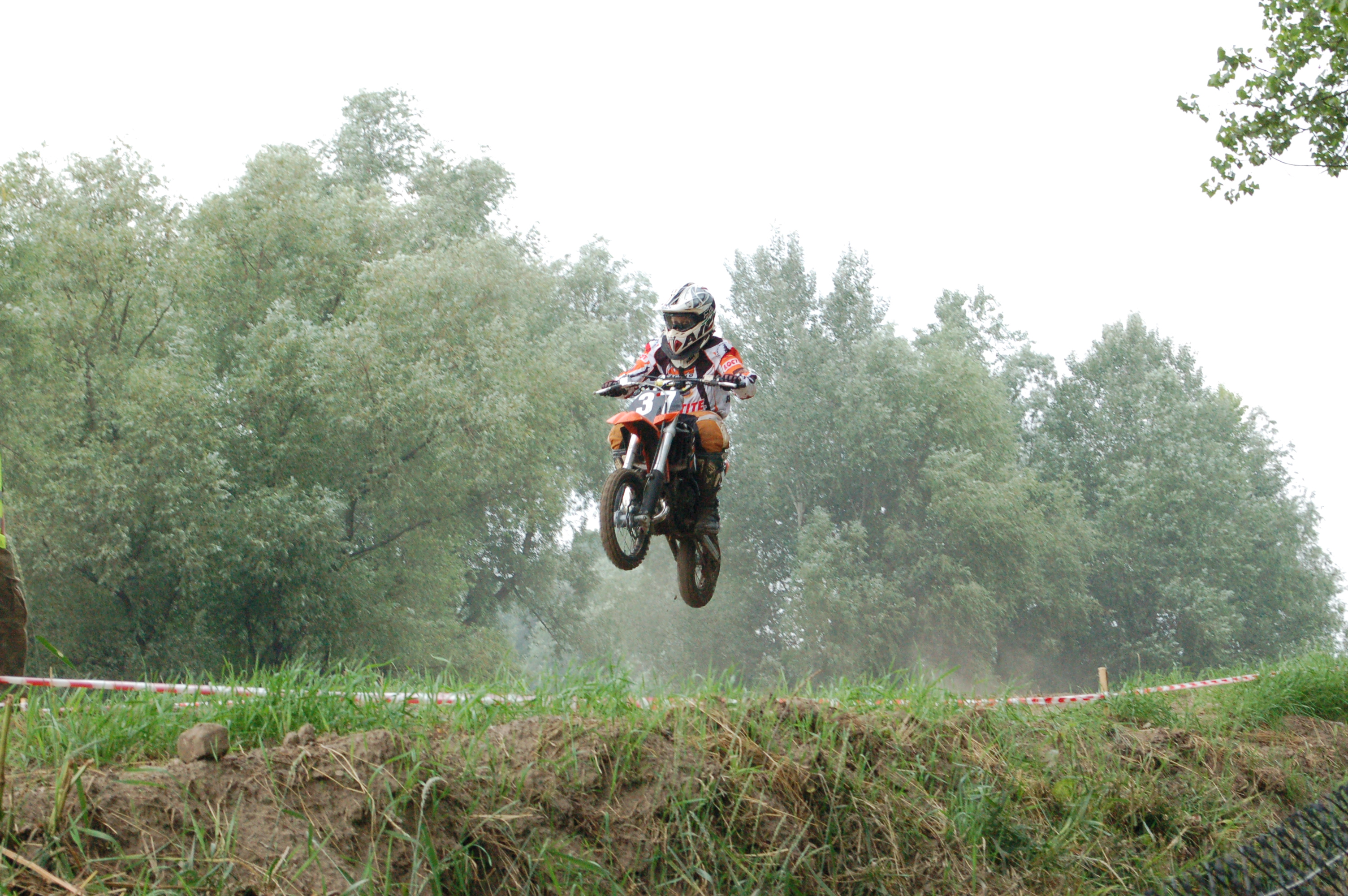 Sochaczew, Moto-Cross-Wettbewerb: XVIII Puchar Burmistrza Sochaczewa, 18./19. Juni 2011